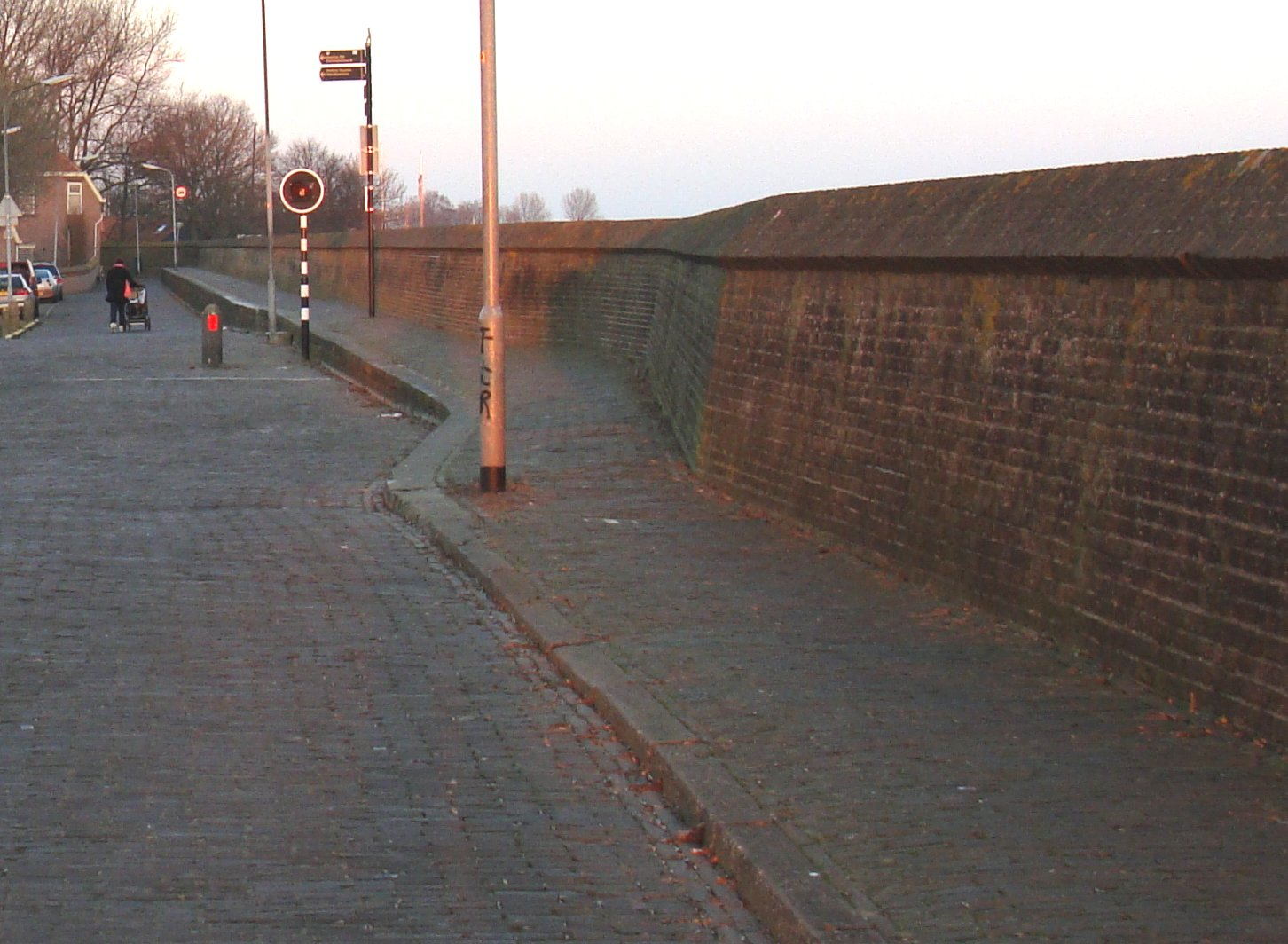 Zeemuur in Enkhuizen, nabij de Bocht